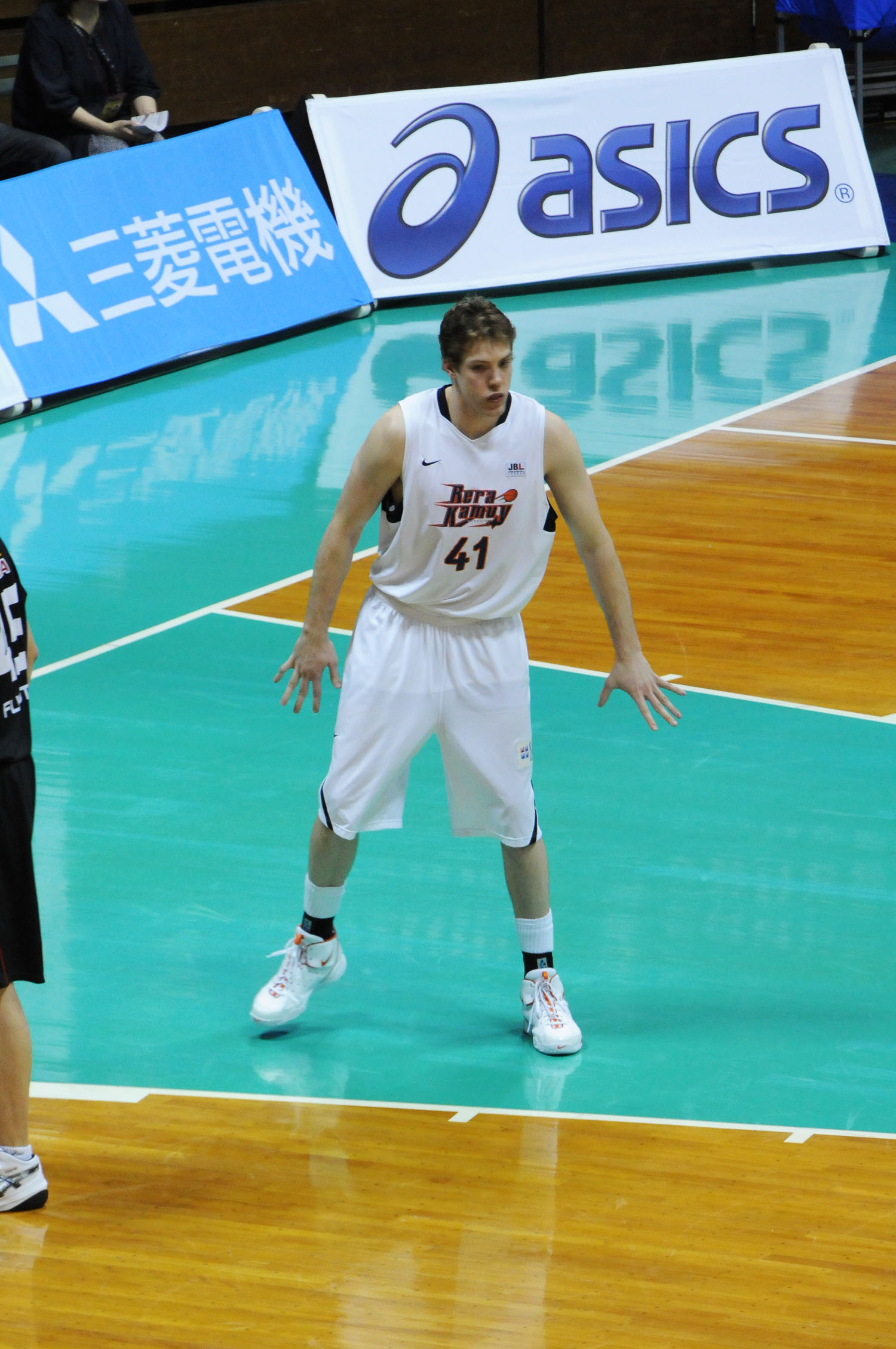 レラカムイ北海道のタイラー・ニュートン選手。代々木第二体育館で。